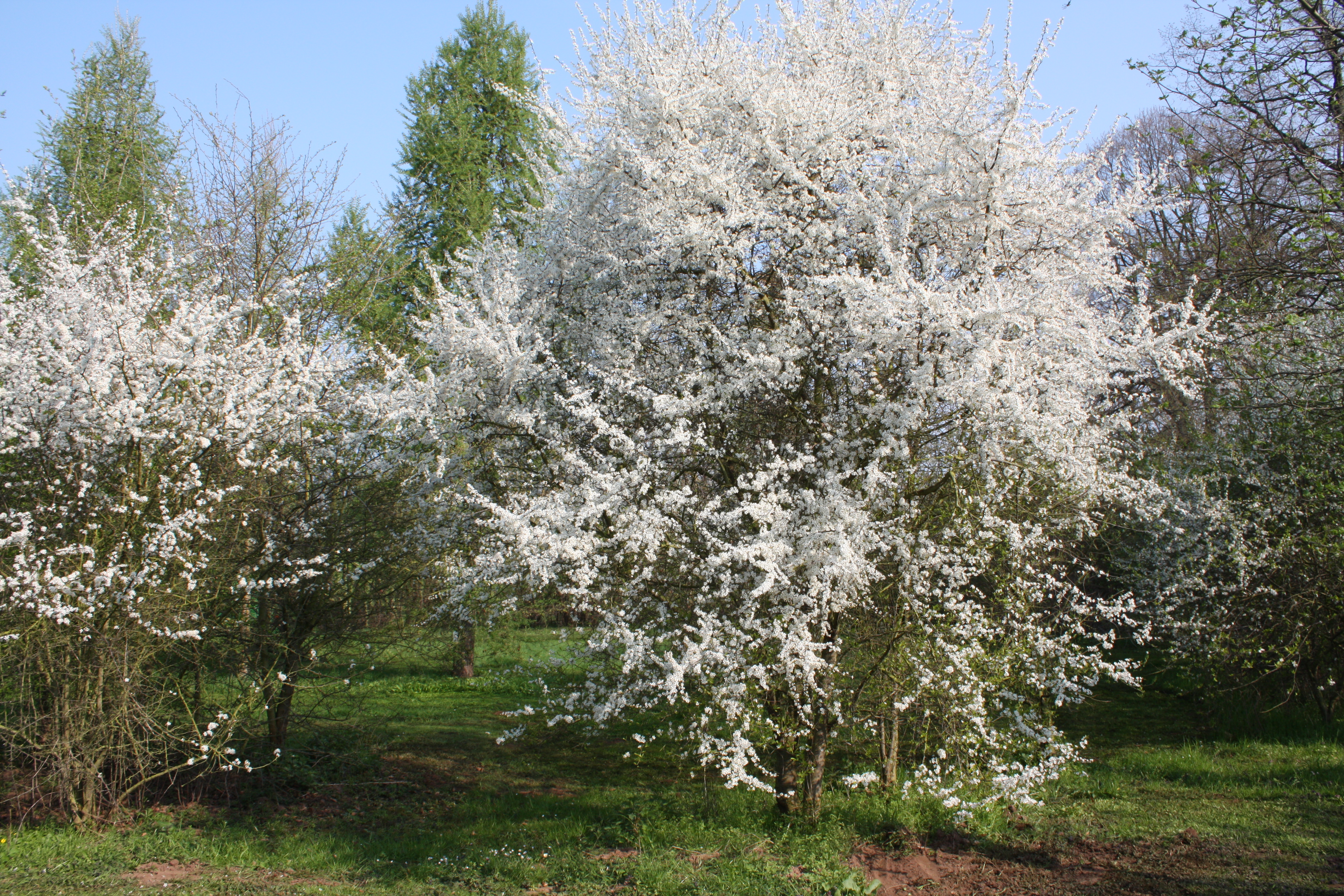 Parkanlagen Schloss Lechenich, Schlehdorn oder Schlehenblüte